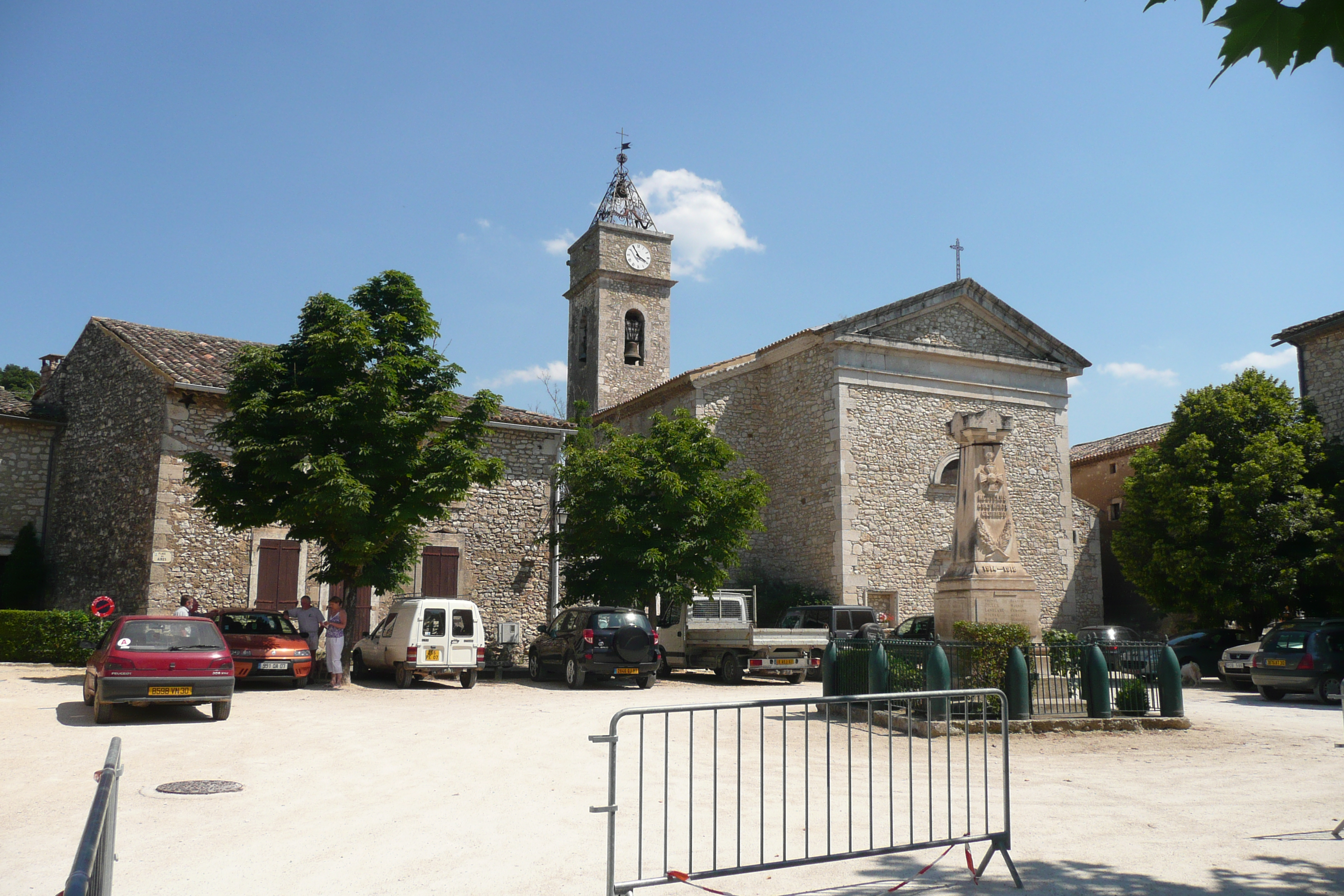 Eglise à Montclus (Gard).